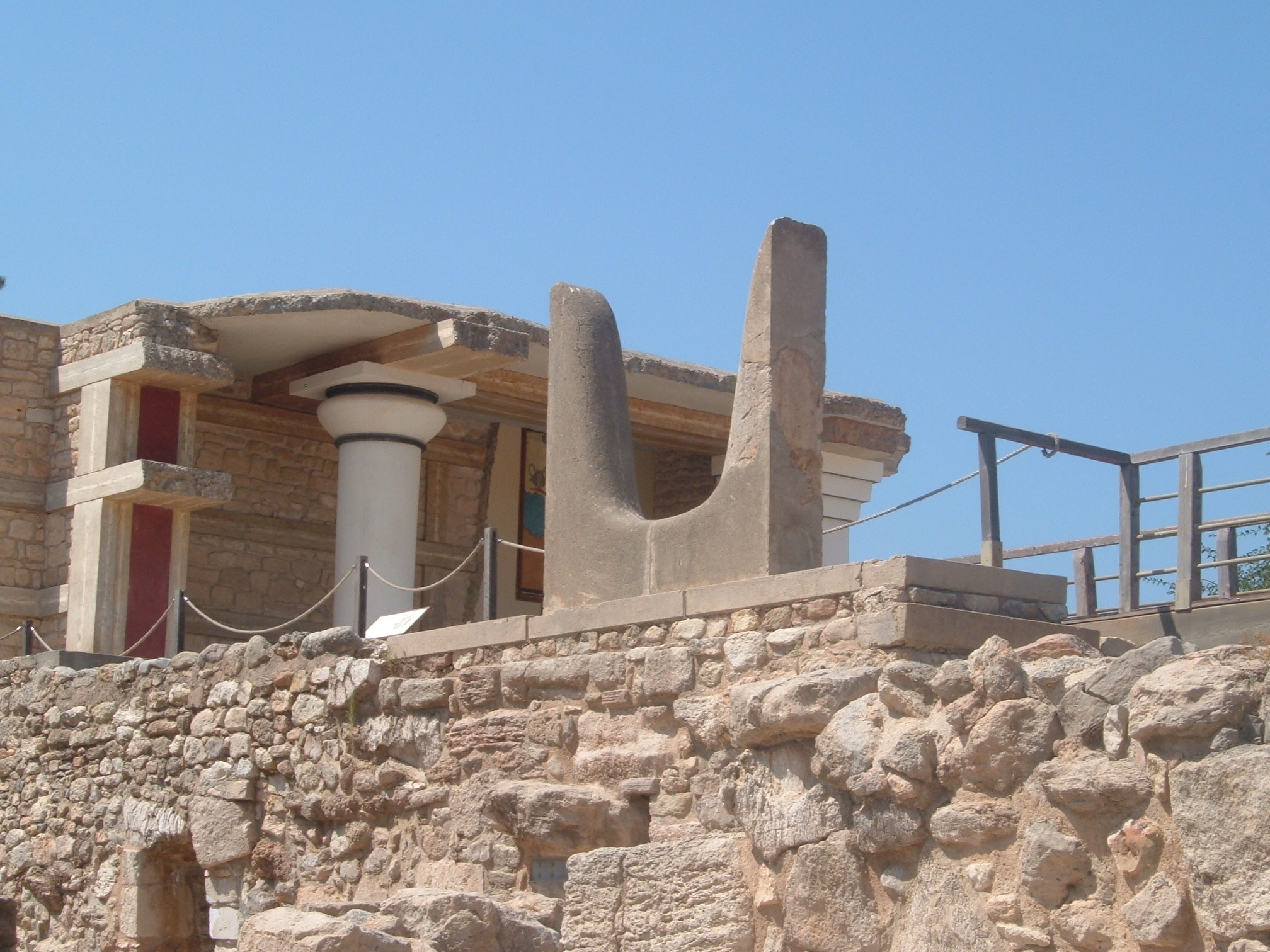 Doubles cornes de minotaure, reconstituée par Evans